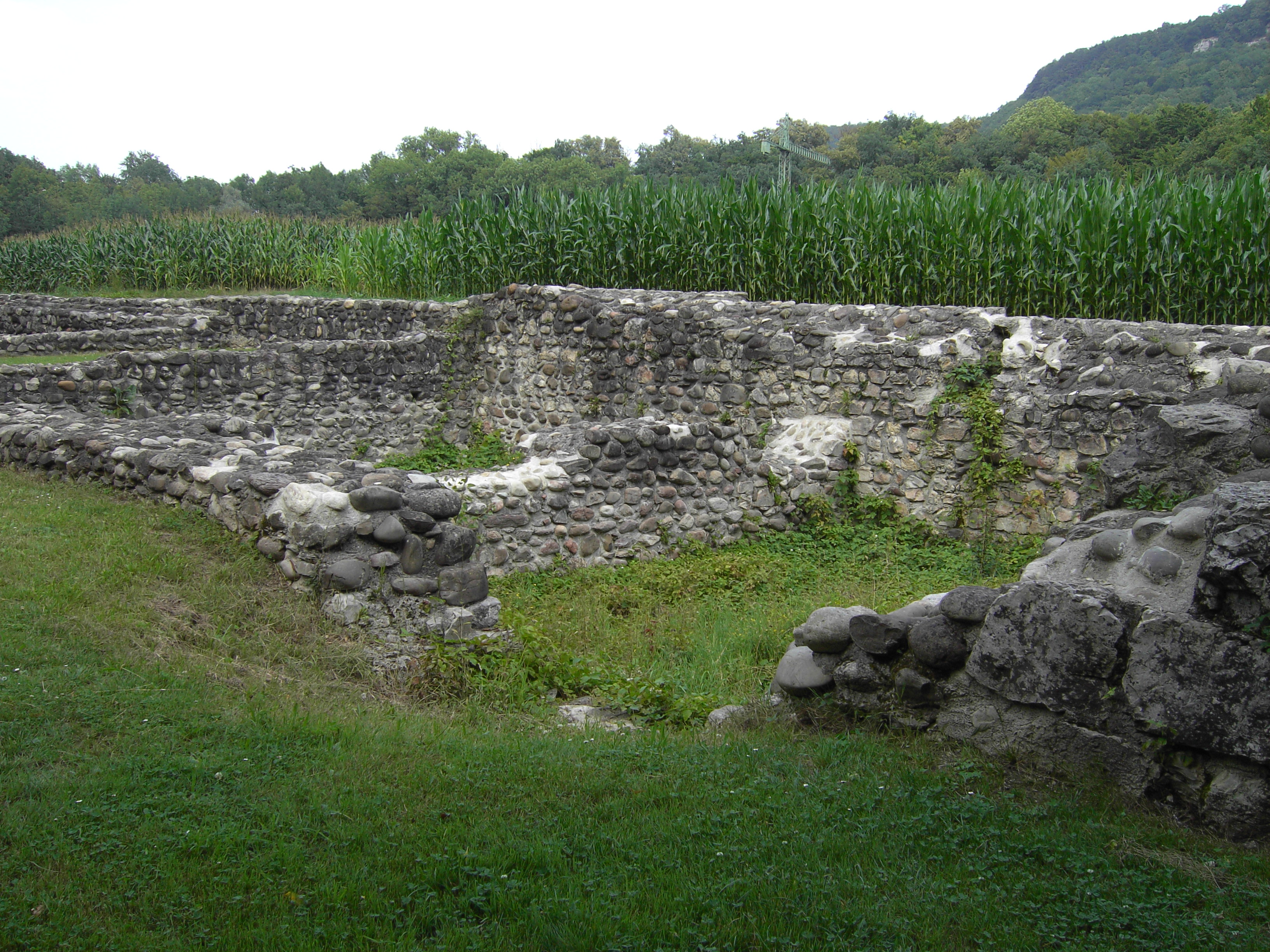 Ruine Freudenau, AG, Switzerland